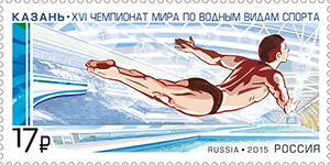 Казань. XVI Чемпионат мира по водным видам спорта